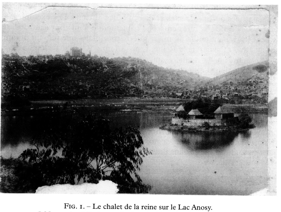 Îlot central du Lac Anosy, Antananarive, Madagascar